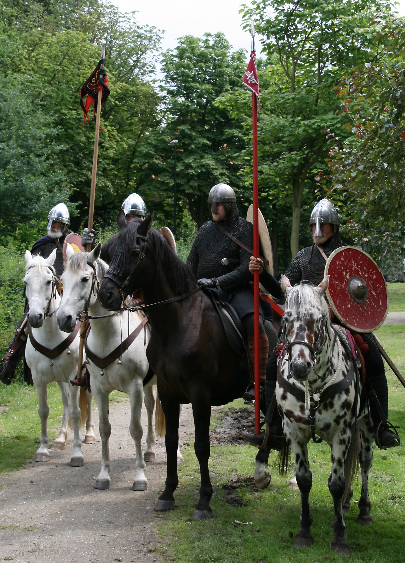 Vlaardingen: reenactment Slag bij Vlaardingen: Duitse cavalerie